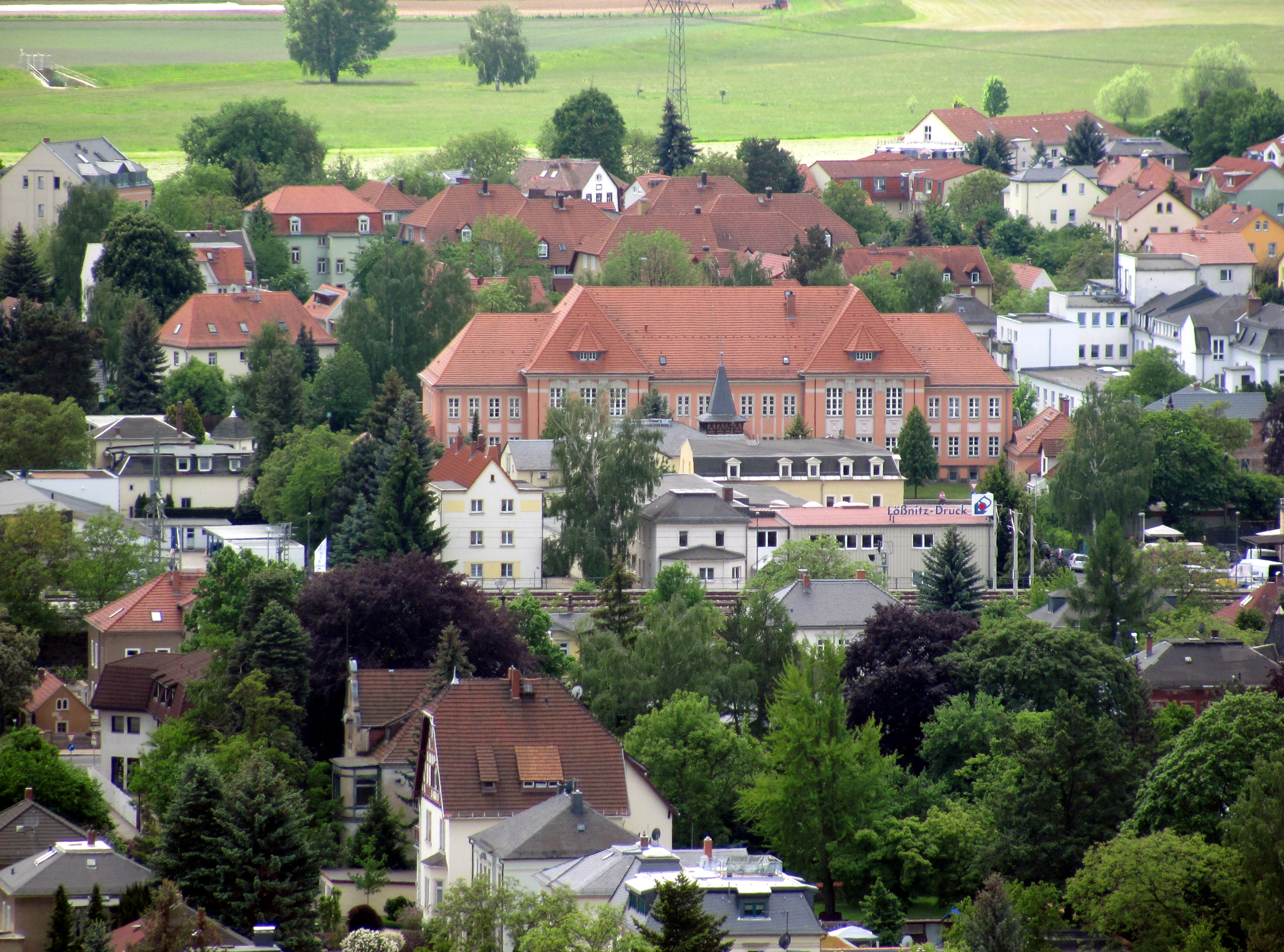 Radebeul, Gebäude des ehem. Amtsgerichts Kötzschenbroda, vom Wasserturm aus. Der spitze Turm davor gehört zur Villa d’Orville von Löwenclau. Am unteren Bildrand von unten: Villa Greif (Radebeul), Villa Sanssouci, Villa Käthe-Kollwitz-Straße 4 (Radebeul)